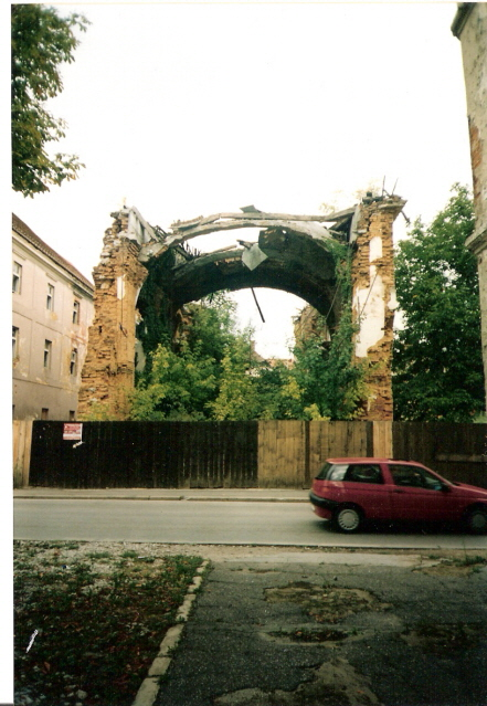 War damaged building in Karlovac * Minirana pravoslavna crkva u ratu 1991-5.g.